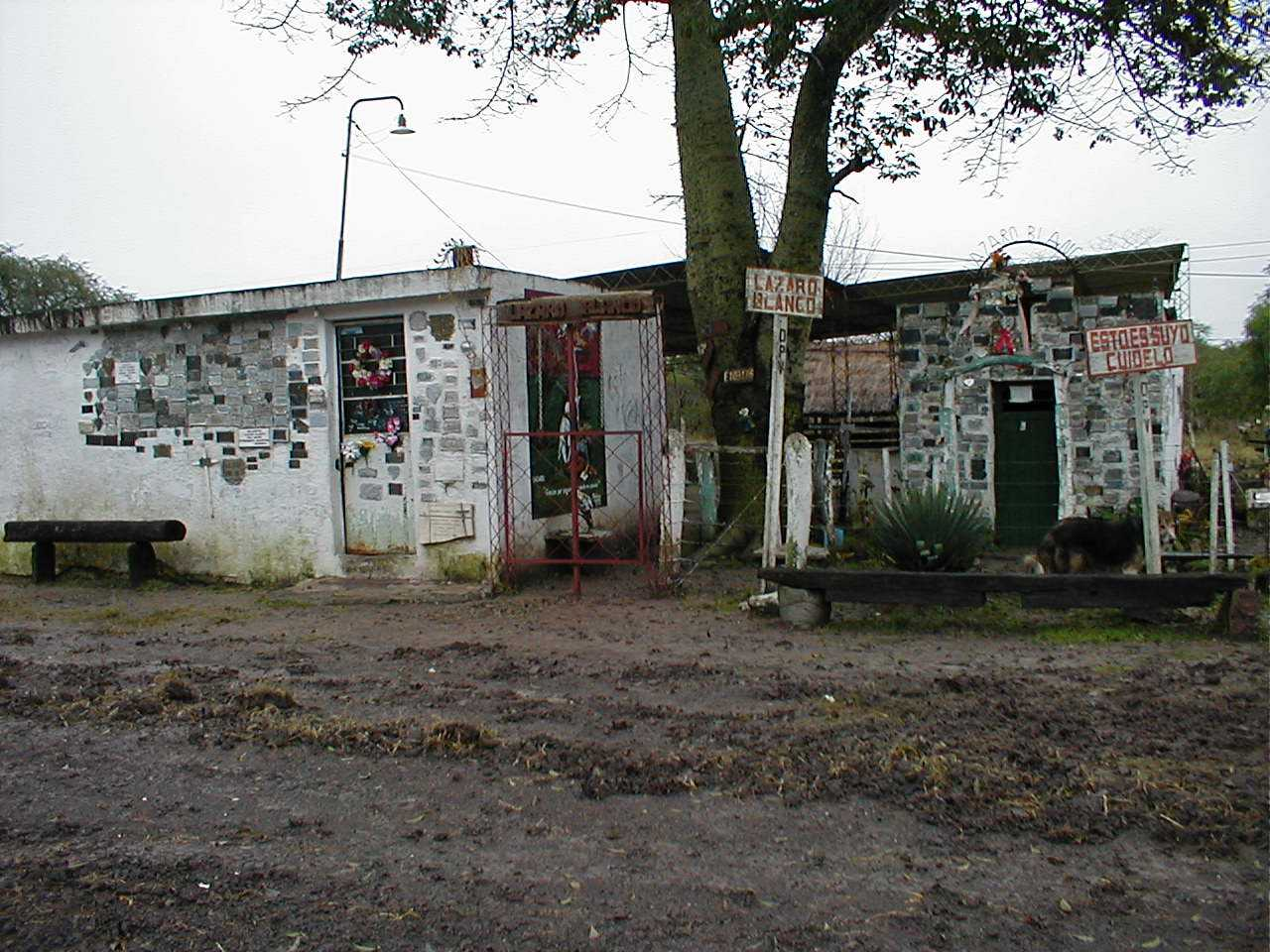 Foto del templete del Lazaro Blanco - Feliciano, Entre Rios